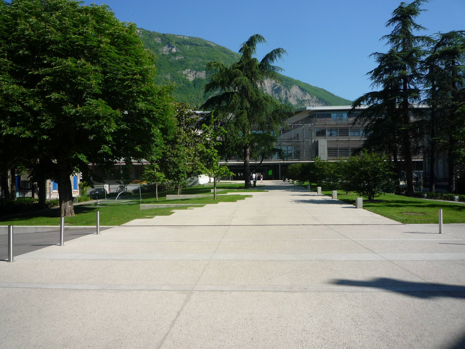 Hôpital couple-enfant sur le site de l'hôpital nord de Grenoble à La Tronche (38).